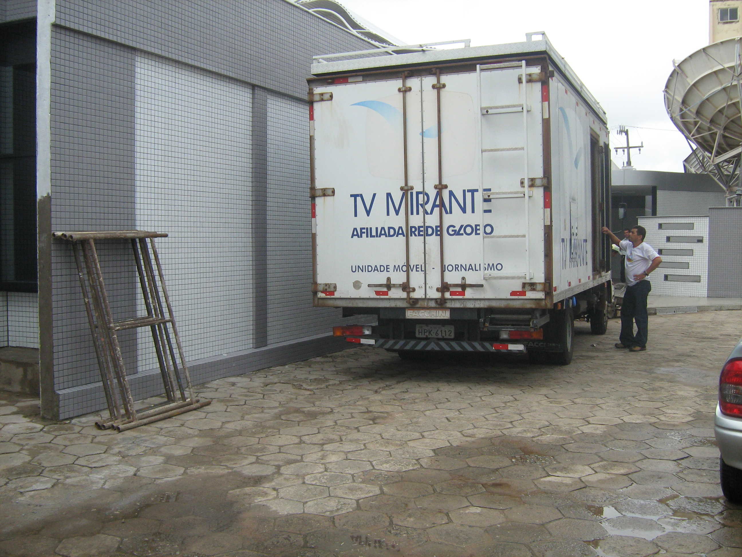 Veículo de Transmissão ao vivo da Tv Mirante